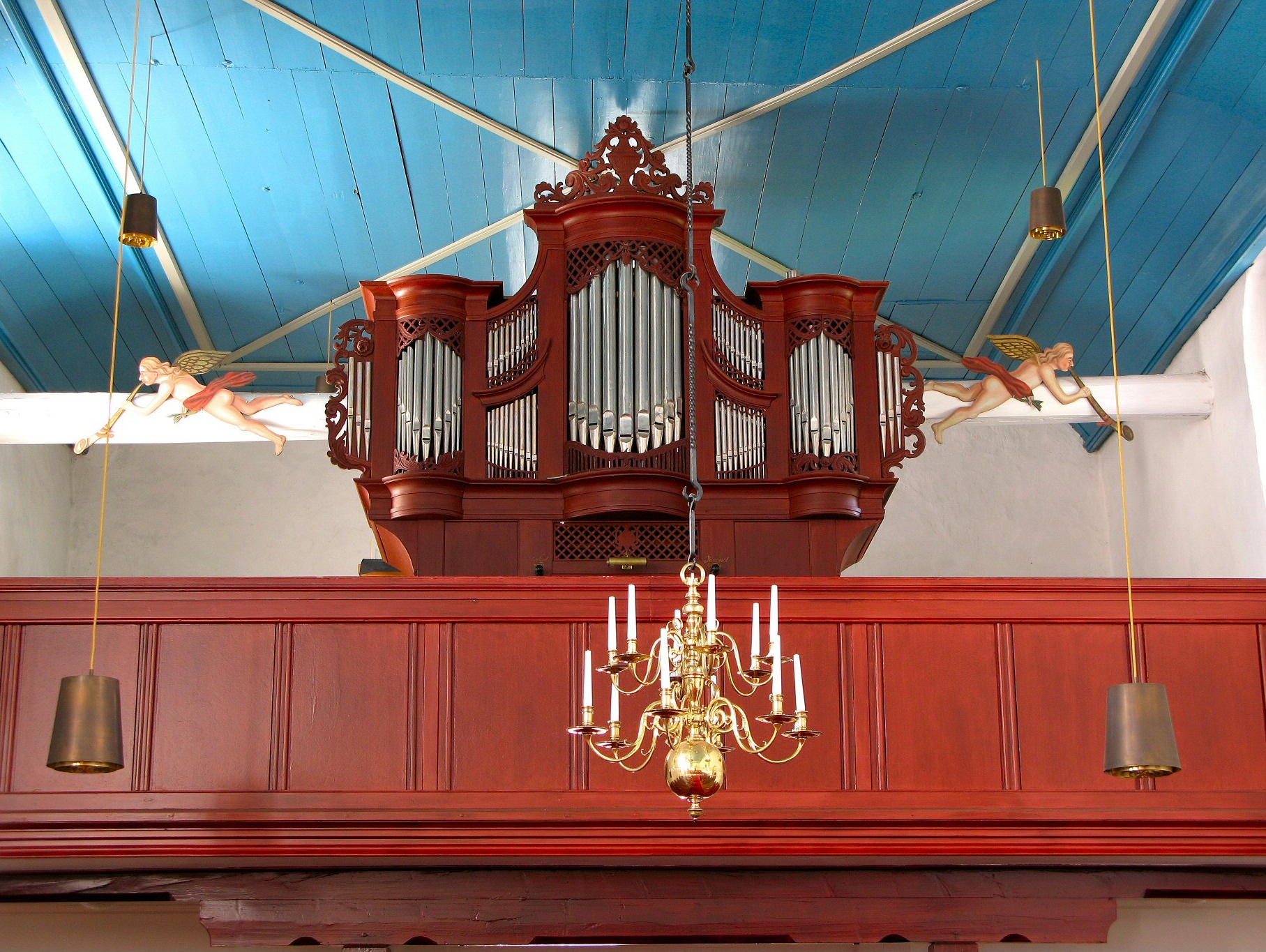 Orgel in Westerholt, Landkreis Wittmund